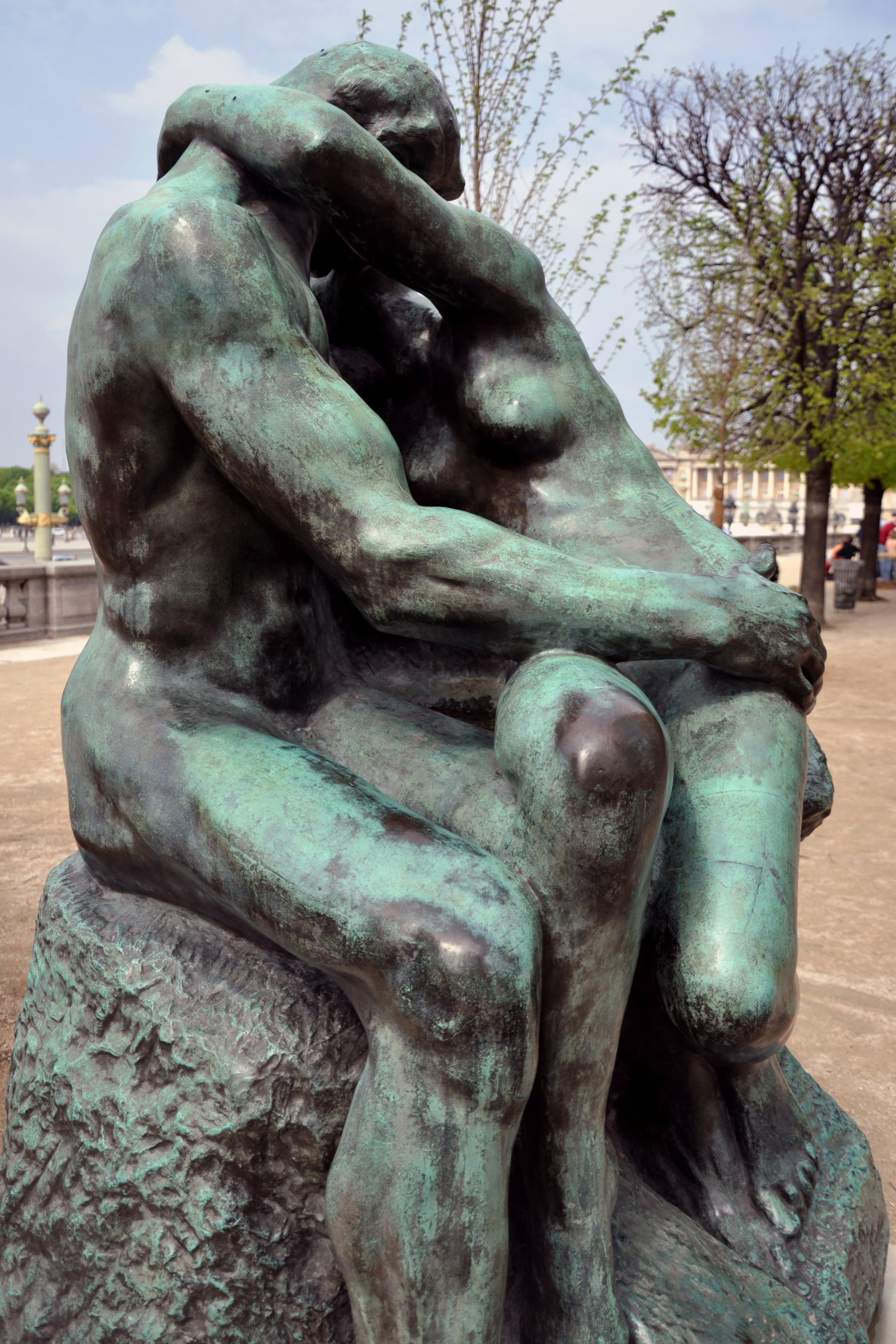 Le Baiser, par Auguste Rodin. Jardin des Tuileries.